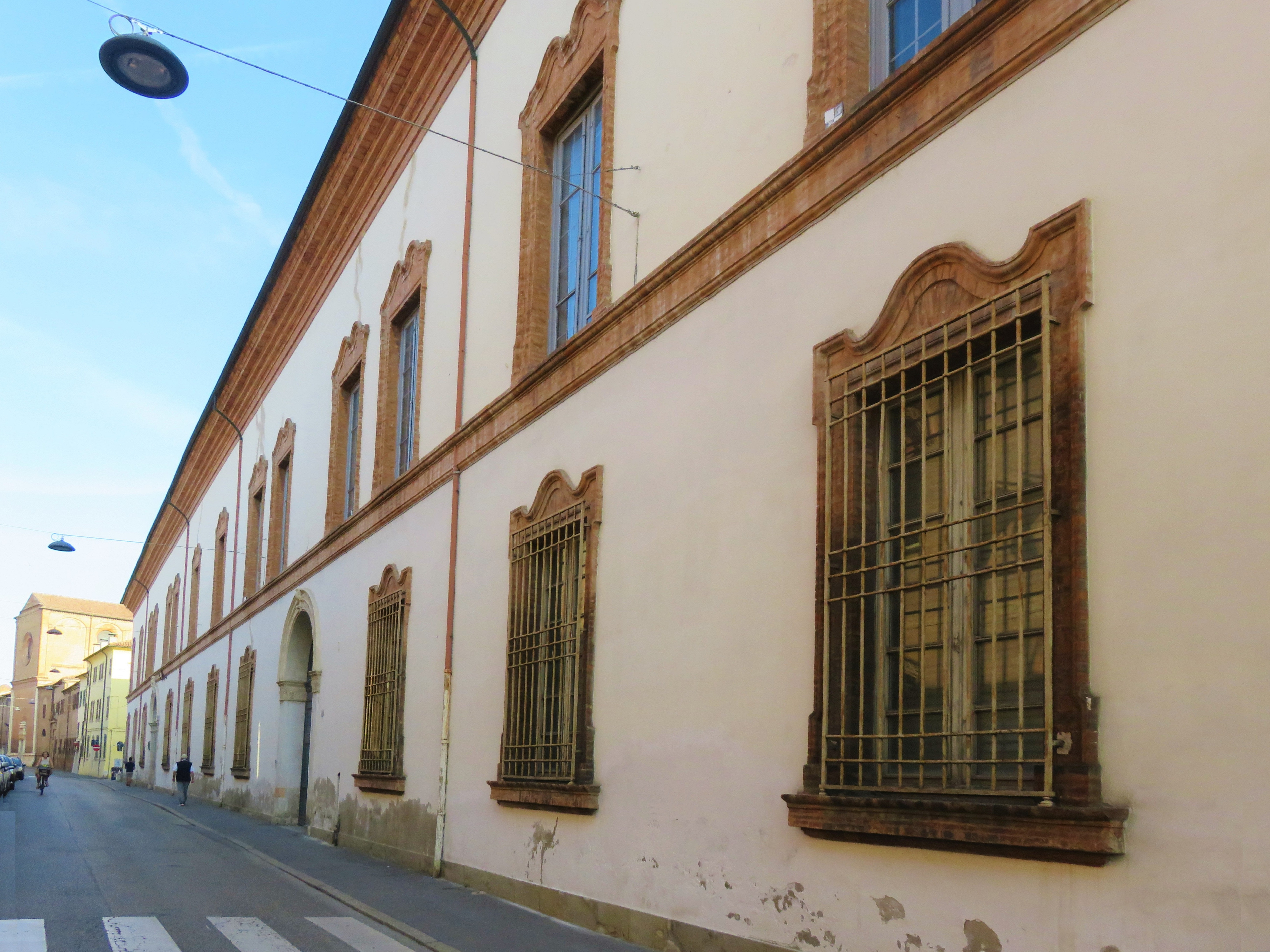 Sede Rettorato Unife